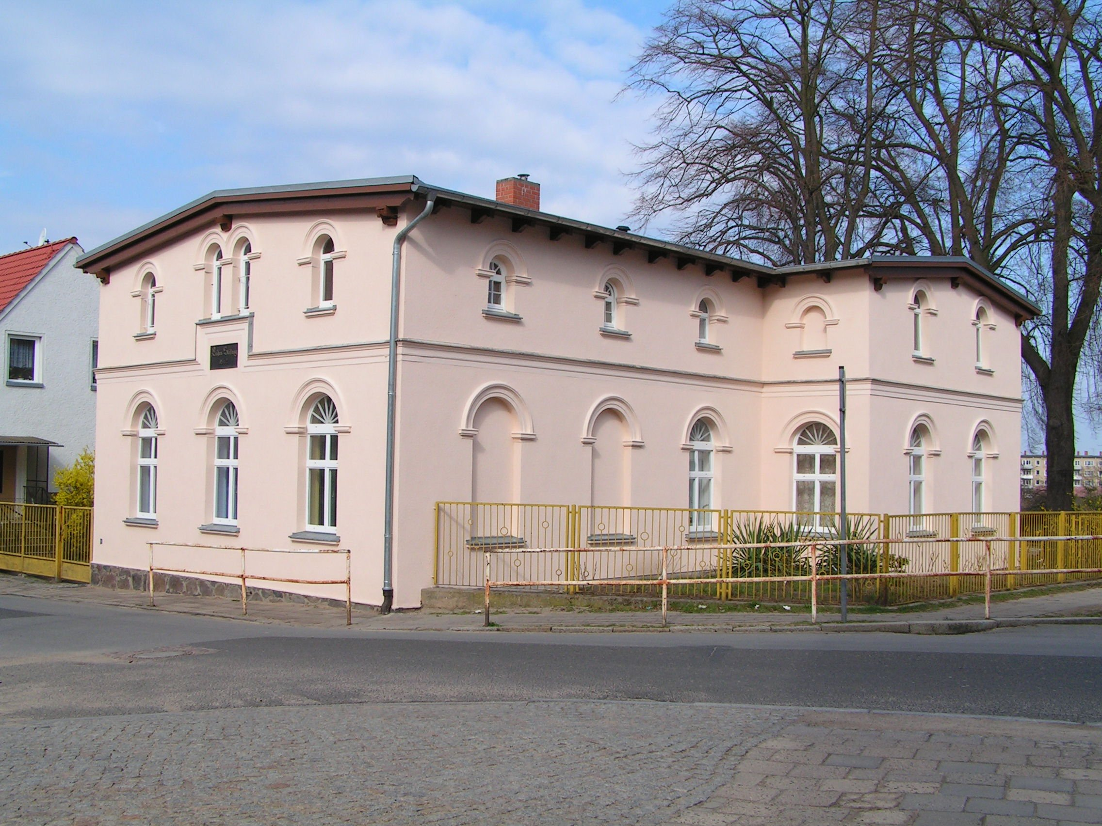 Luisenstift (histor.: Louisenstift) in der Mühlenstraße in Neustrelitz, erster Kindergarten in Mecklenburg-Strelitz (1842, Architekt: Friedrich Wilhelm Buttel)